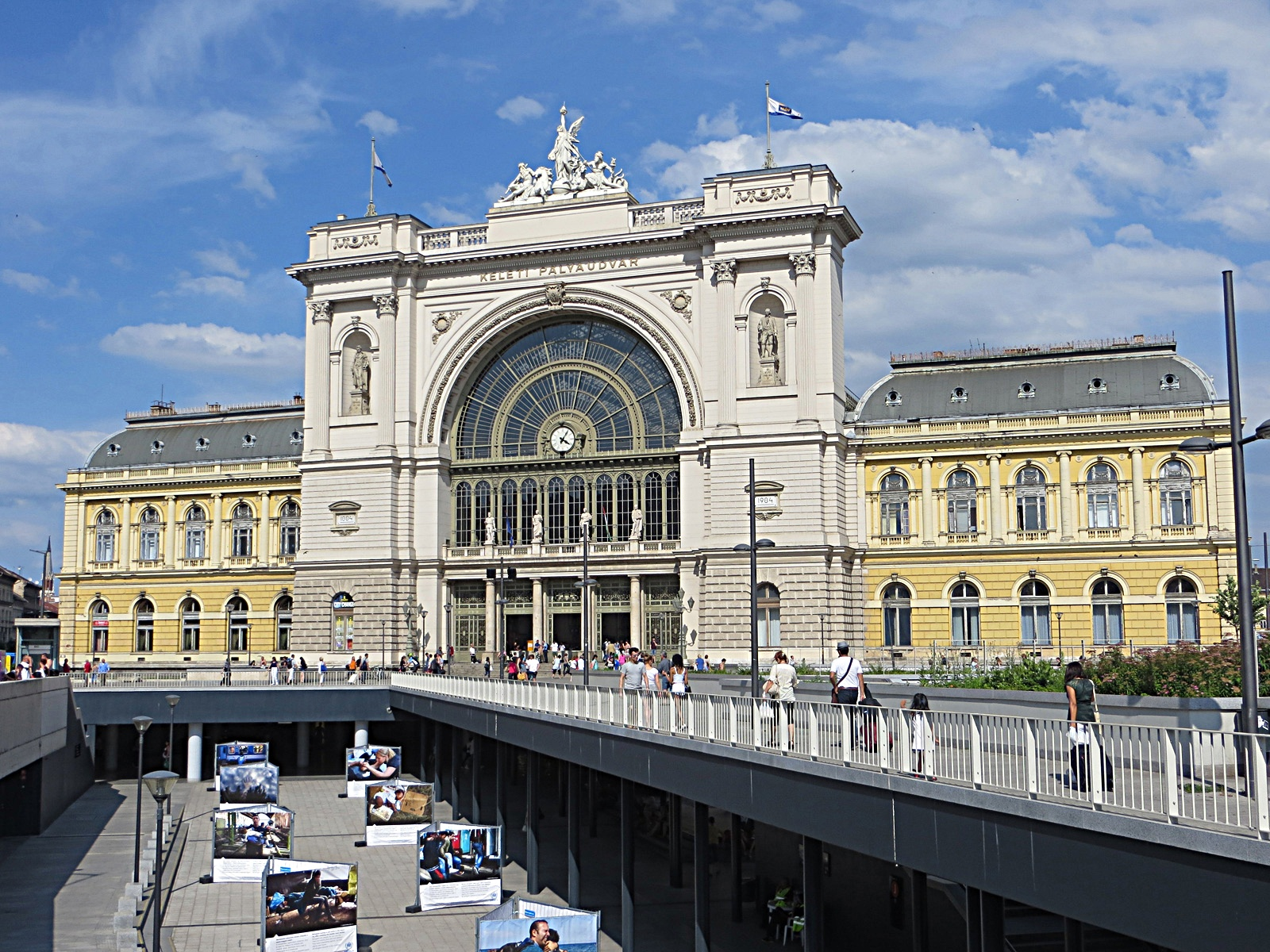 Budapest-Keleti Pályaudvar